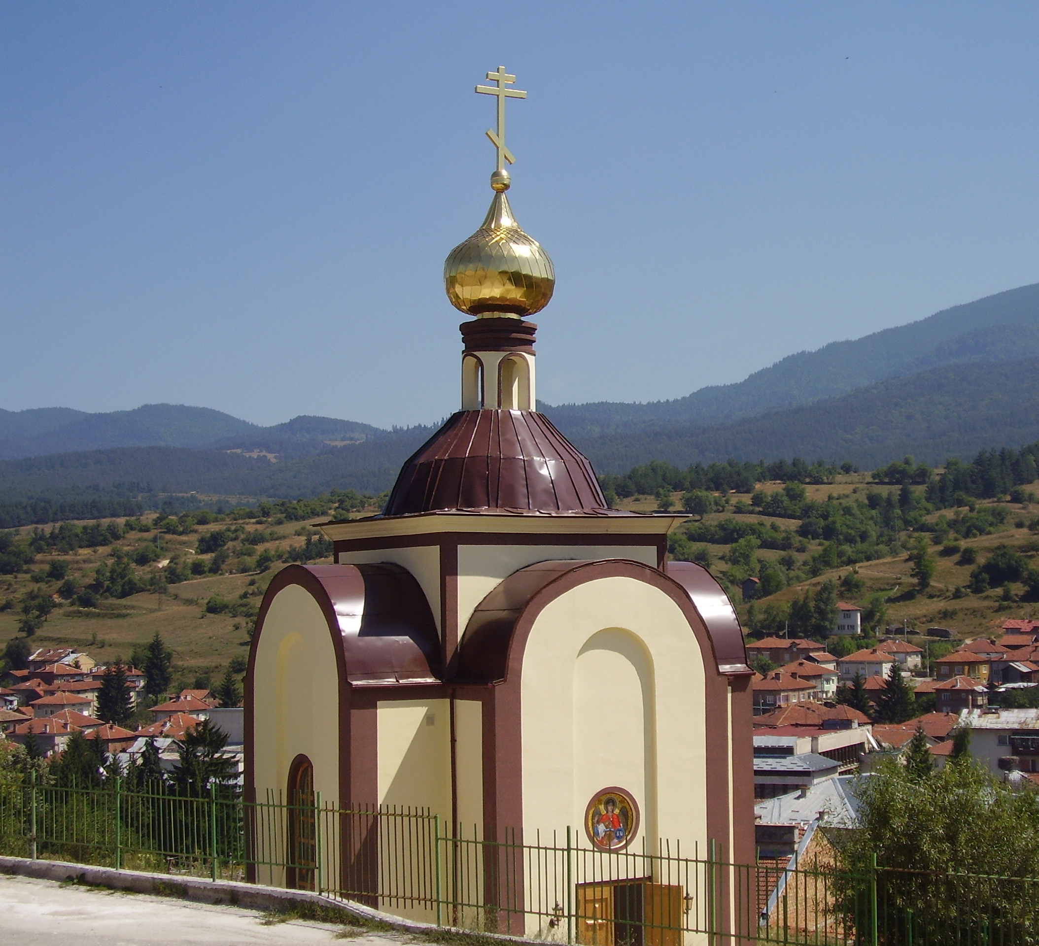 Православен храм (параклис) “Св. Архангел Михаил”, гр.Батак